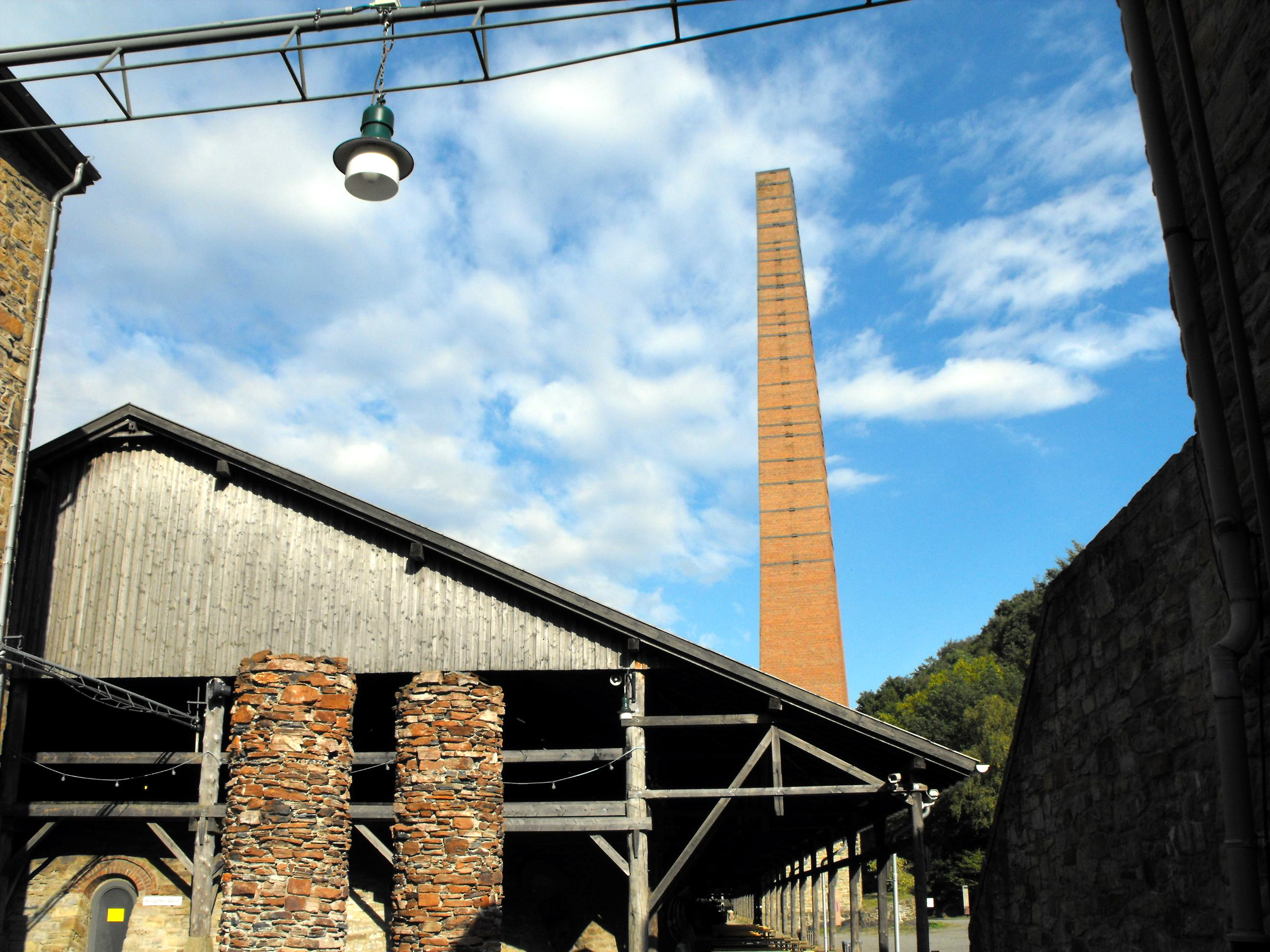 Industriemuseum Zeche Nachtigall in Witten; Blick vom Bereich zwischen Maschinen- und Werkstattgebäude der Zeche Nachtigall aufs Gebäude der ehemaligen Ziegelei Dünkelberg (mit Schornstein) This is a photograph of an architectural monument.